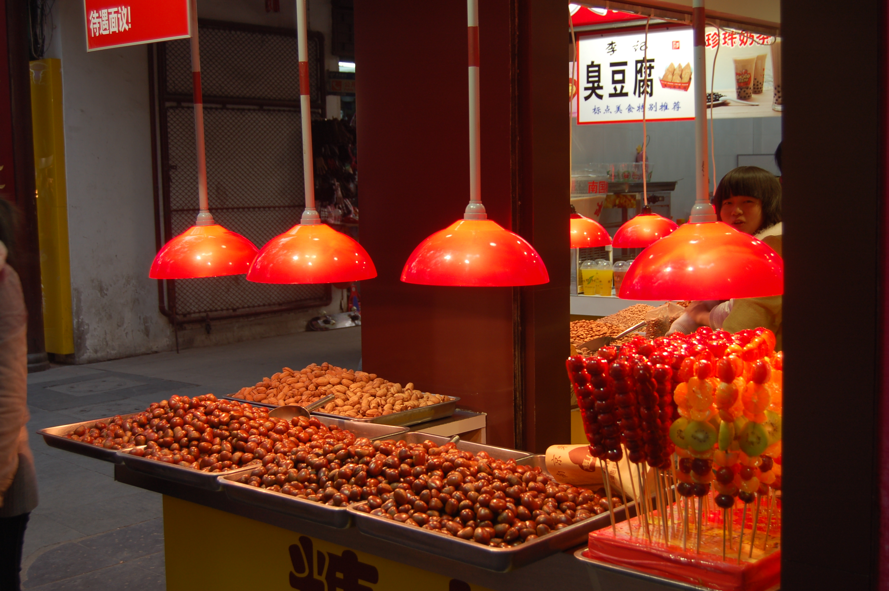 Fuzi Miao Corner Nut Mongers